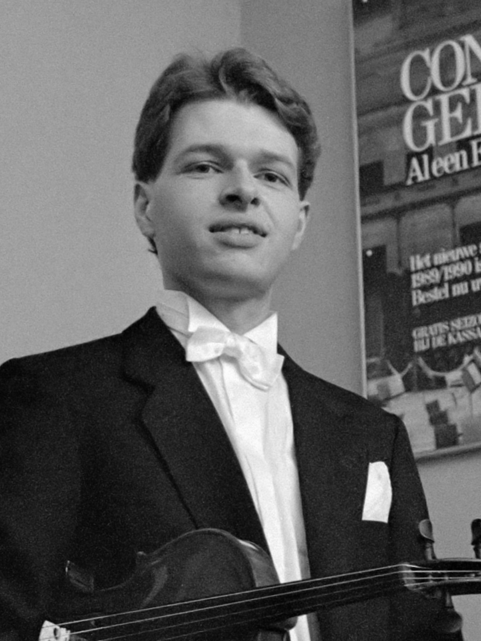 Roeland Gehlen wint het Oskar Back vioolconcours. Roeland Gehlen met viool 25 maart 1989